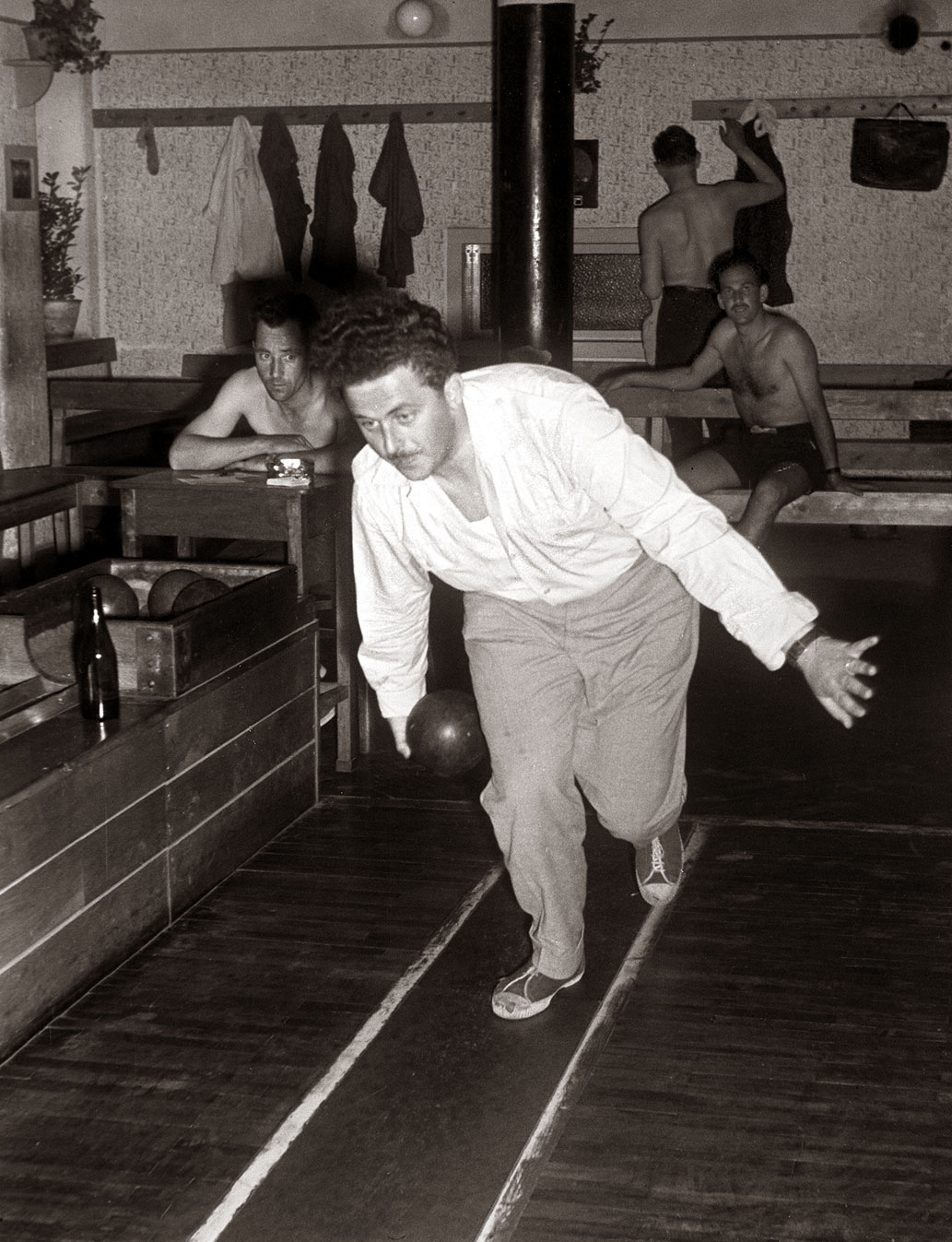 Miro Steržaj